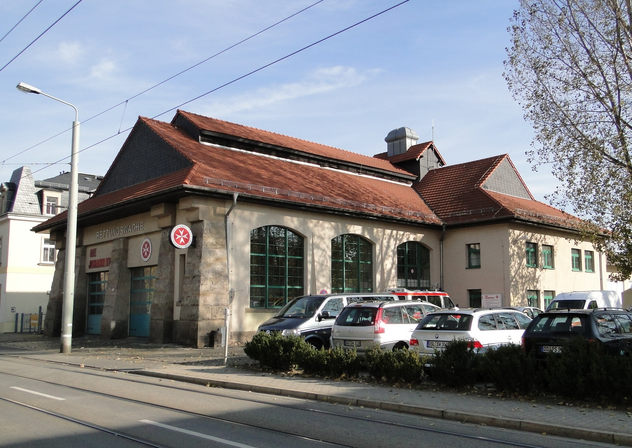 ehemaliges Straßenbahndepot Dresden-Leuben, heute durch die Johanniter-Unfall-Hilfe genutzt